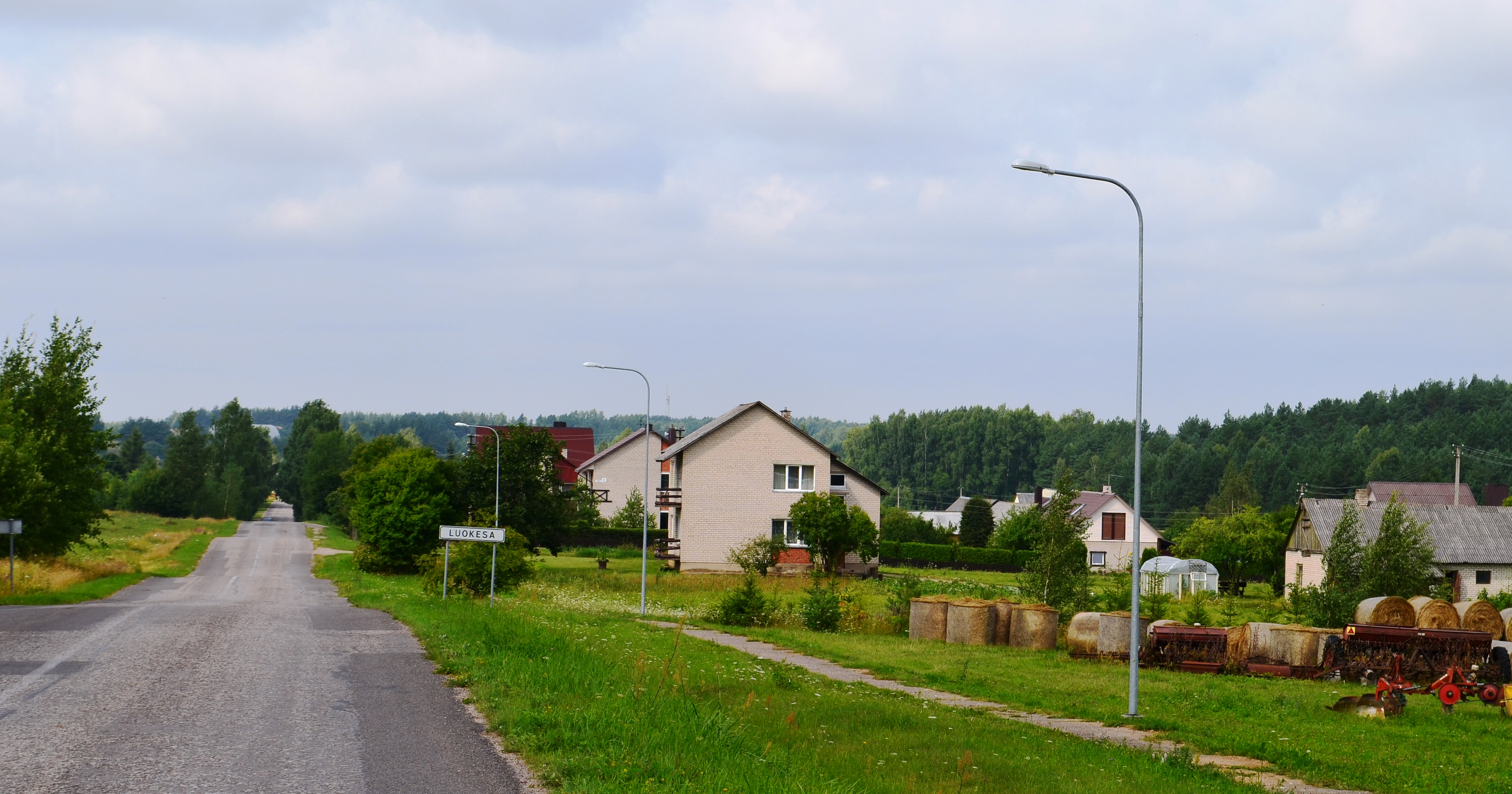 Luokesa, Molėtų r.